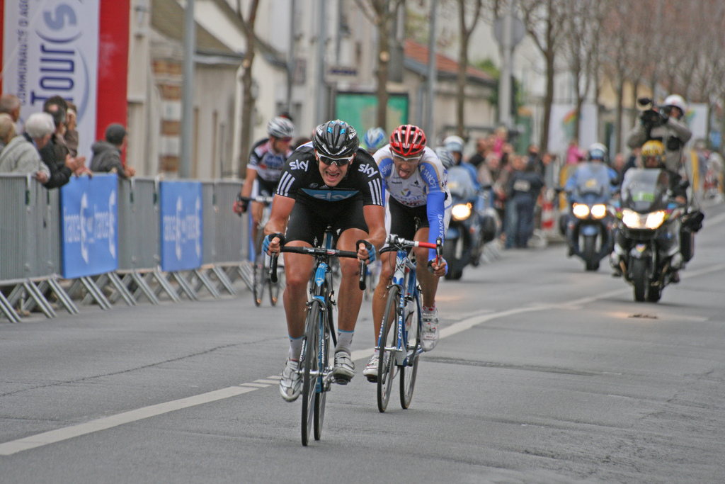 SKY PROCYCLING